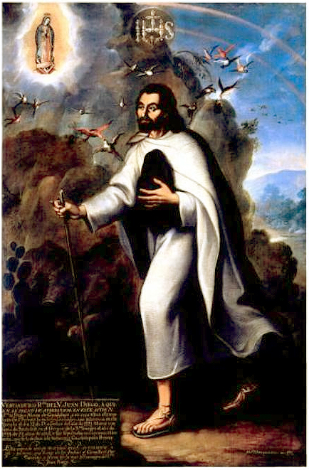 Fiel retrato do venerável Juan Diego